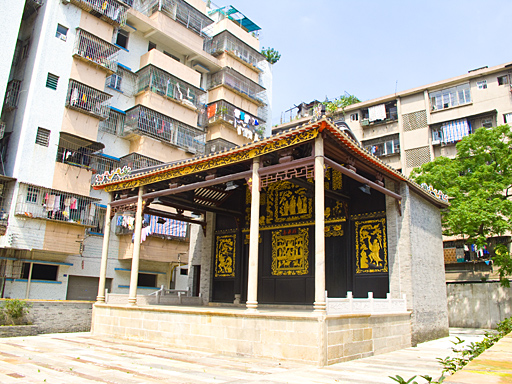 石戏台